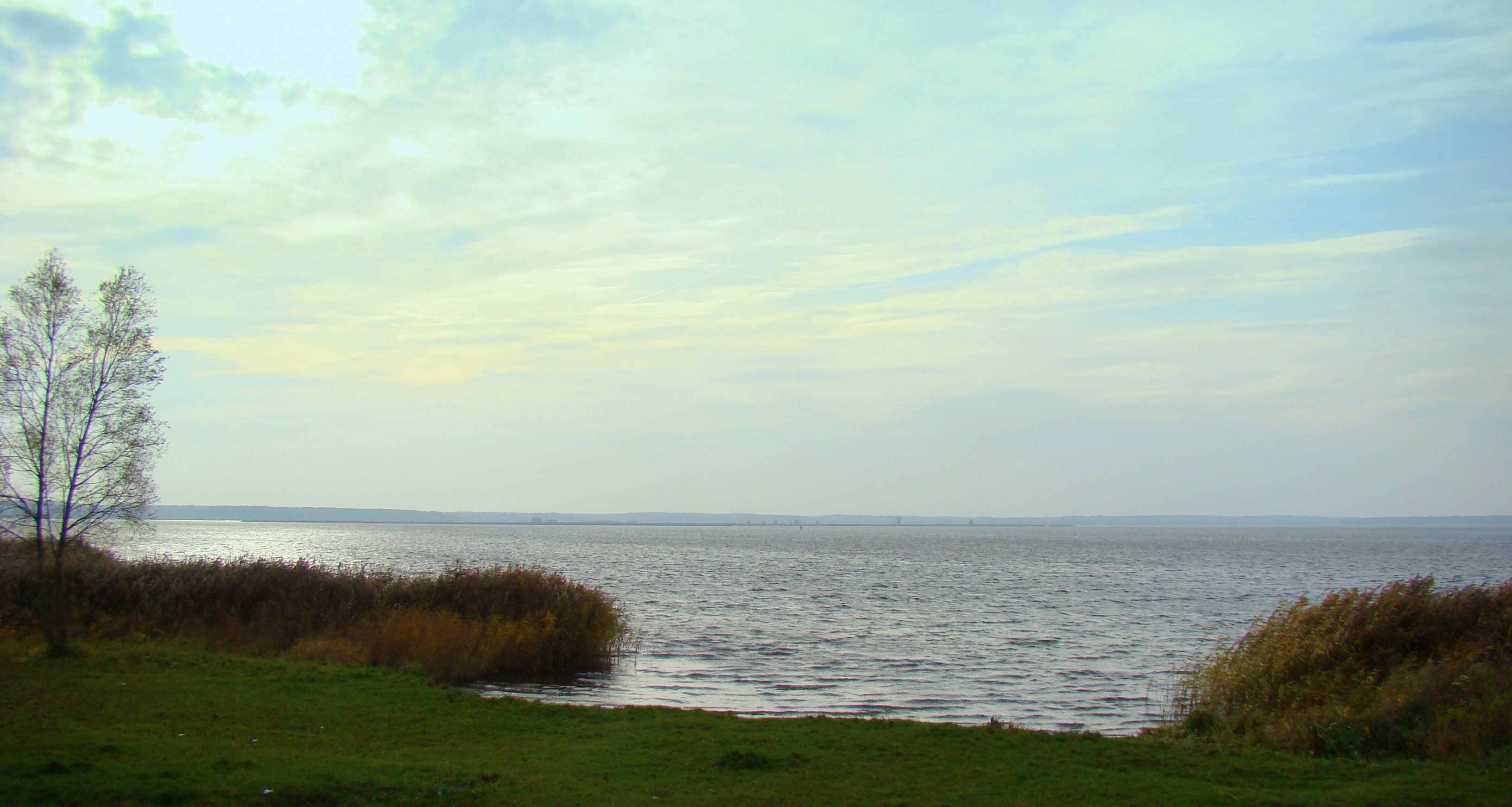 Jezioro Nowowarpieńskie (gmina Nowe Warpno, województwo zachodniopomorskie), Polska / (Powiat Uecker-Randow, Meklemburgia-Pomorze Przednie), Niemcy